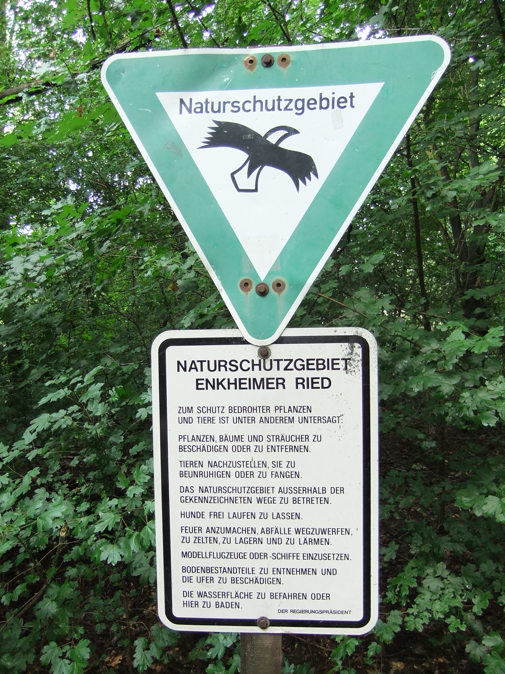 Alle Enkheimer Alteichenbestände befinden sich am Südrand des Naturschutzgebiets Enkheimer Ried